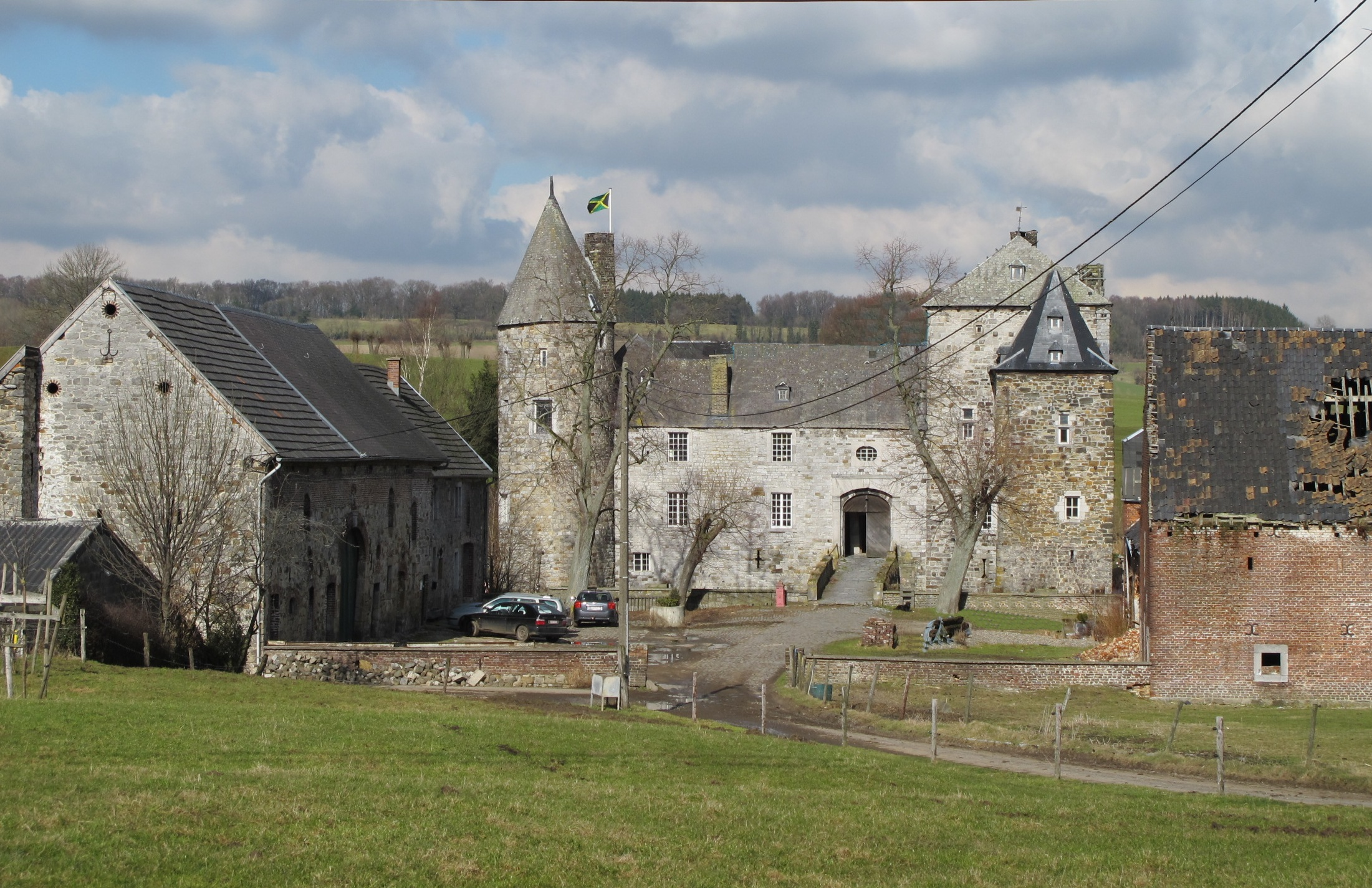 Schloss Streversdorp Montzen